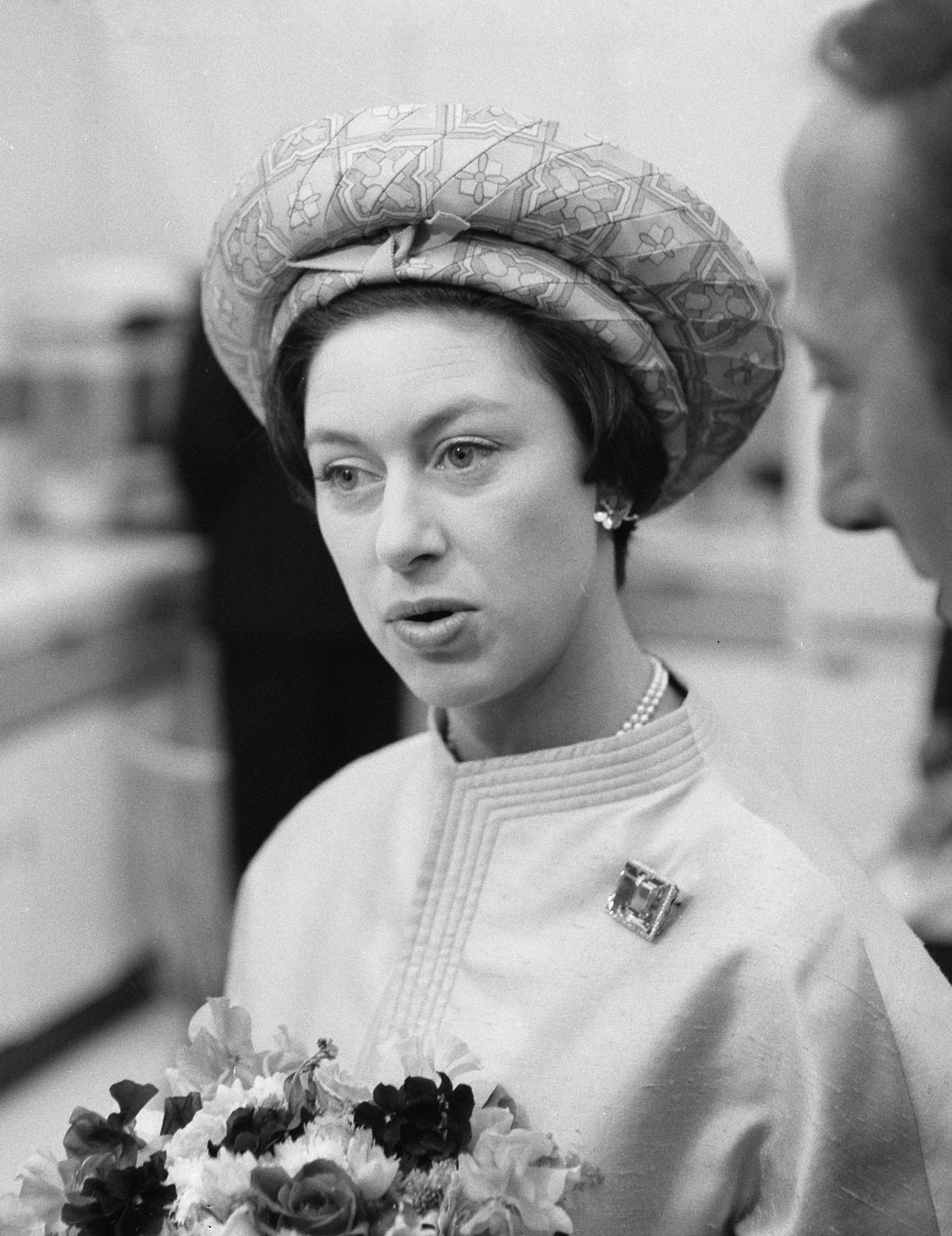 Prinses Margaret en Lord Snowdon op de tentoonstelling Museumplein, Prinses Margaret (kop)